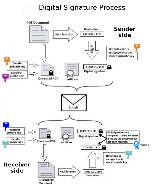 Criando e verificando a assinatura digital de um documento.